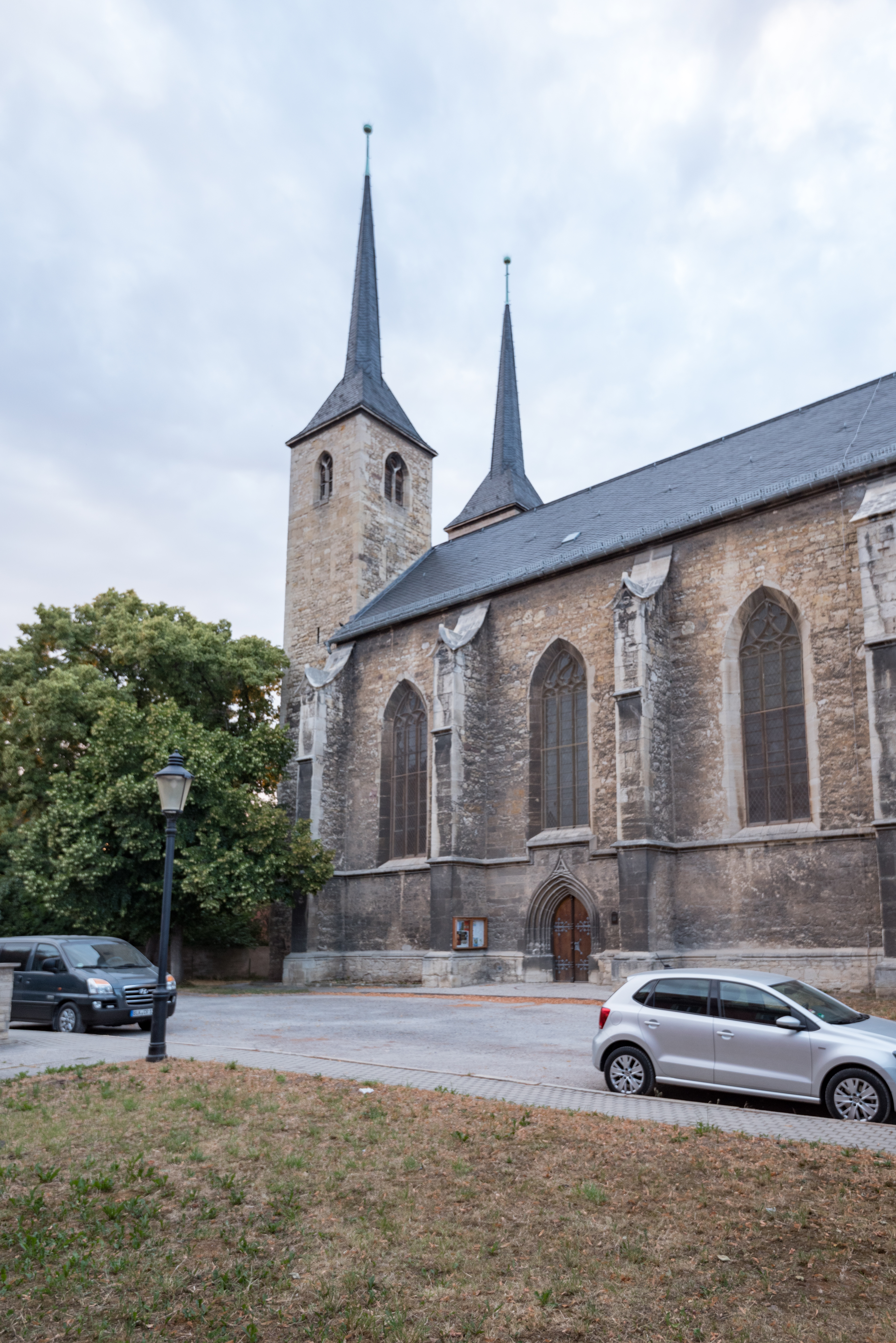 Naumburg (Saale), Moritzberg, Moritzkirche